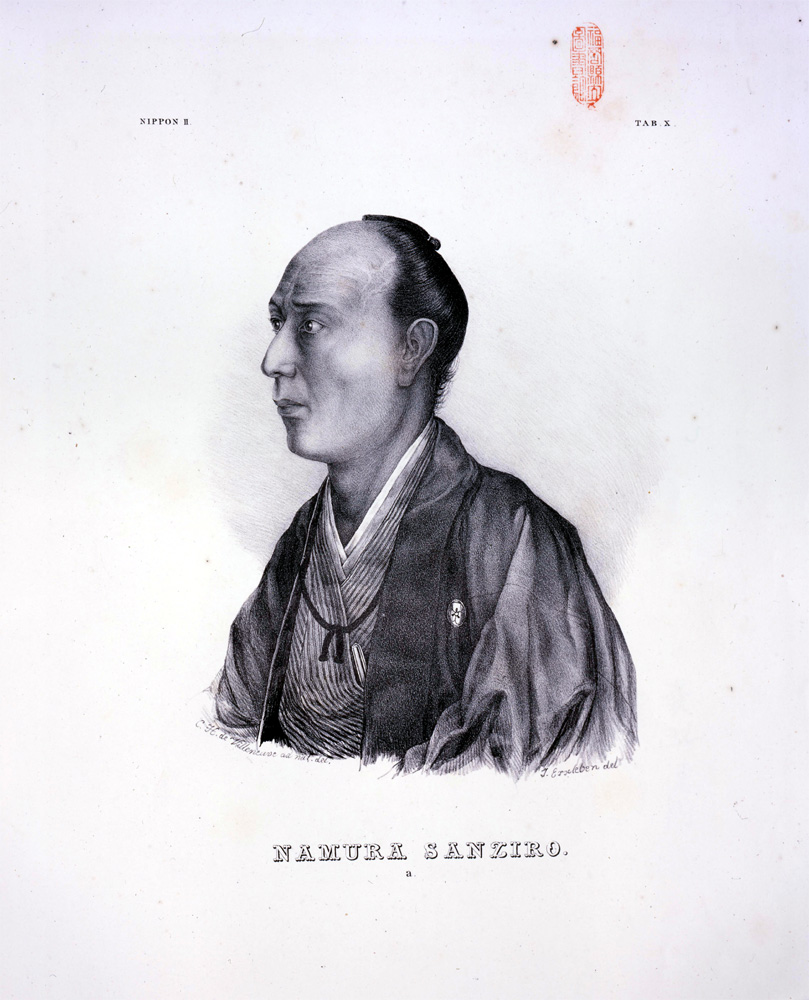 名村三次郎